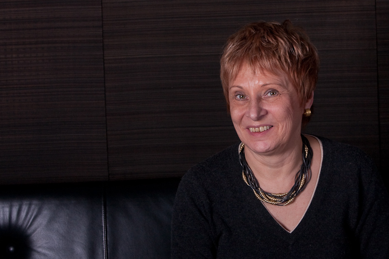 Landtagsabgeordnete Niedersachsen, 16. Wahlperiode (Fotoprojekt Landtagsabgeordnete Niedersachsen am 24. und 25. November 2009)